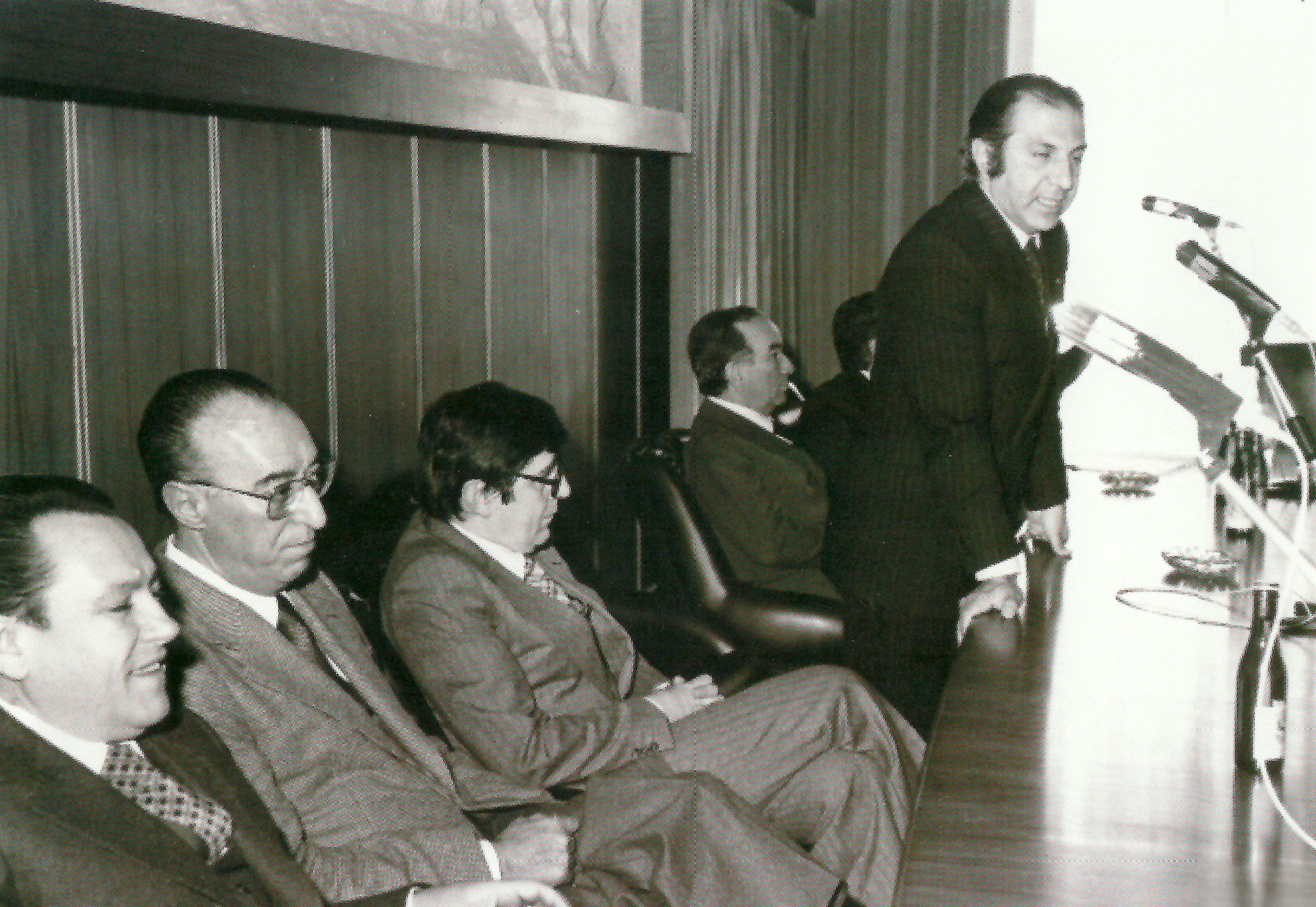 Siracusa, 1977. Quale futuro per la Sicilia industriale? Da sinistra: l' on. Santi Nicita, l' on. Vito Scalia, il Ministro del Lavoro Vincenzo Scotti, l' on. Enzo Nicotra